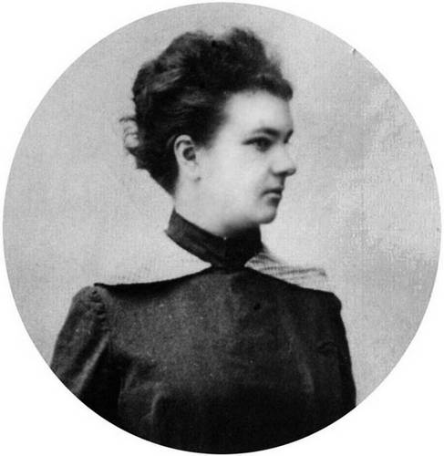 Александра Николаевна Голицына, ур. Мещерская (1864—1941)